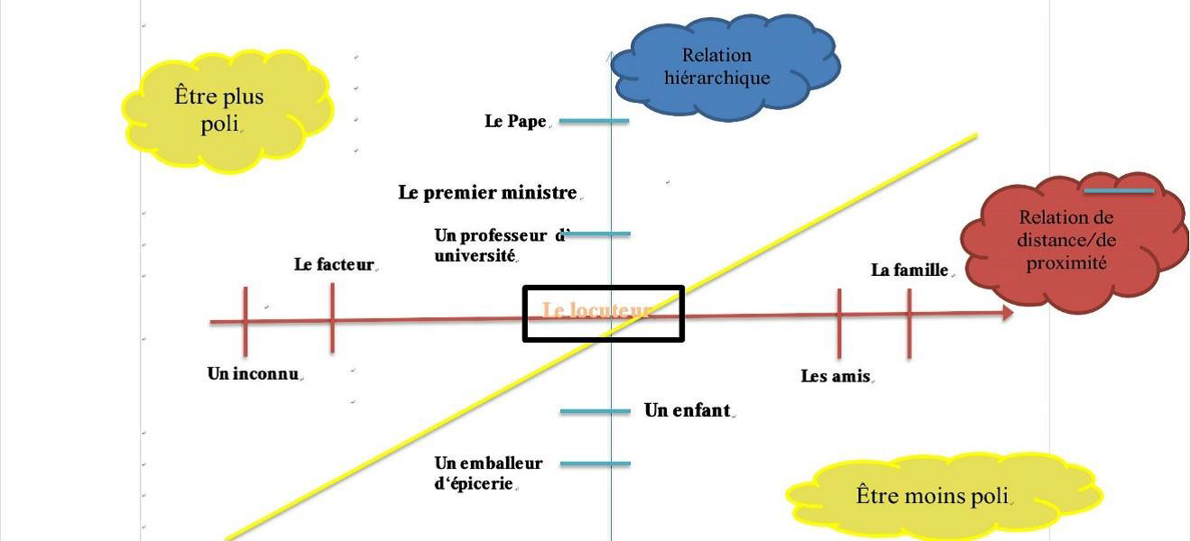 Il s'agit d'un schéma des axes vertical et horizontal de la politesse. L'axe vertical est nommé "relation hiérarchique". De bas en haut, on peut y lire les graduations suivantes: "un emballeur d'épicerie", "un enfant", "le locuteur", "un professeur d'université", "le premier ministre", "le Pape". L'axe horizontal est intitulé "relation de distance/de proximité". De gauche à droite, on peut y lire les graduations suivantes: "un inconnu", "le facteur", "le locuteur", "les amis", la famille". Une diagonale sépare en deux triangles le graphique. Dans la partie supérieure gauche, on peut lire "Plus poli", et dans la partie inférieure droite, on peut lire "moins poli".